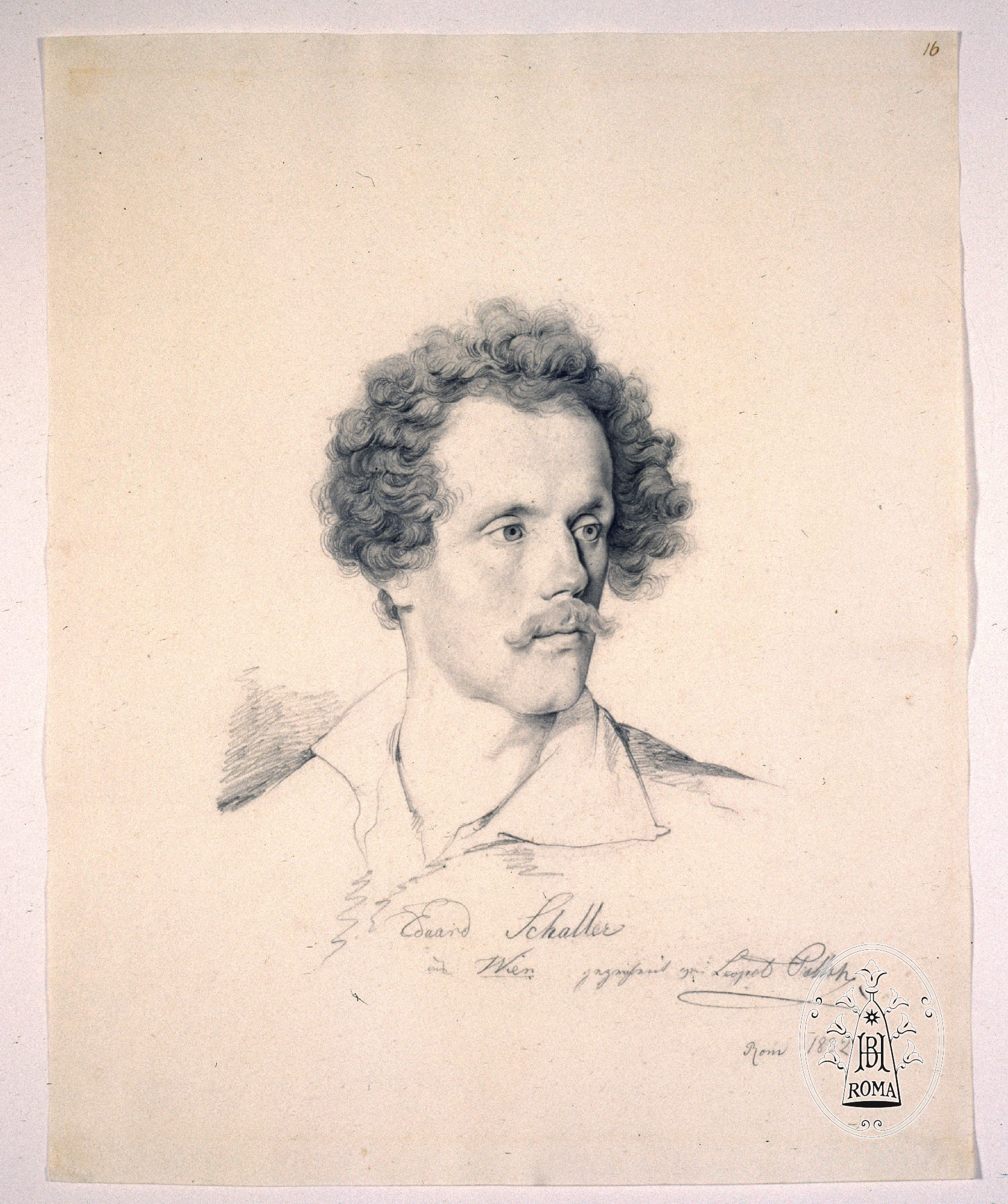 Porträt Eduard Schaller aus Wien, gezeichnet von Leopold Pollack, Rom 1832